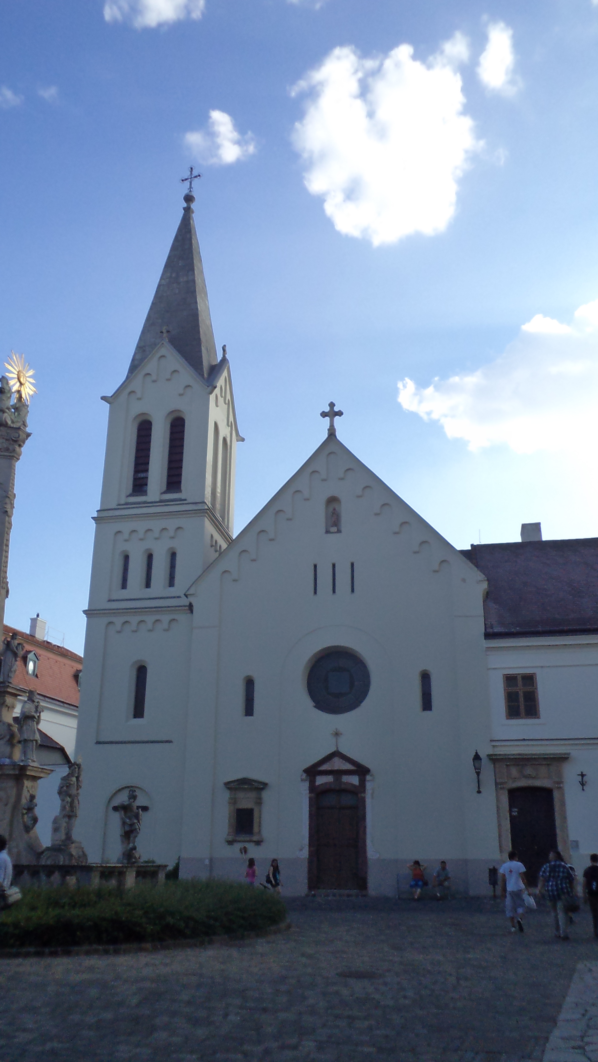 Veszprém